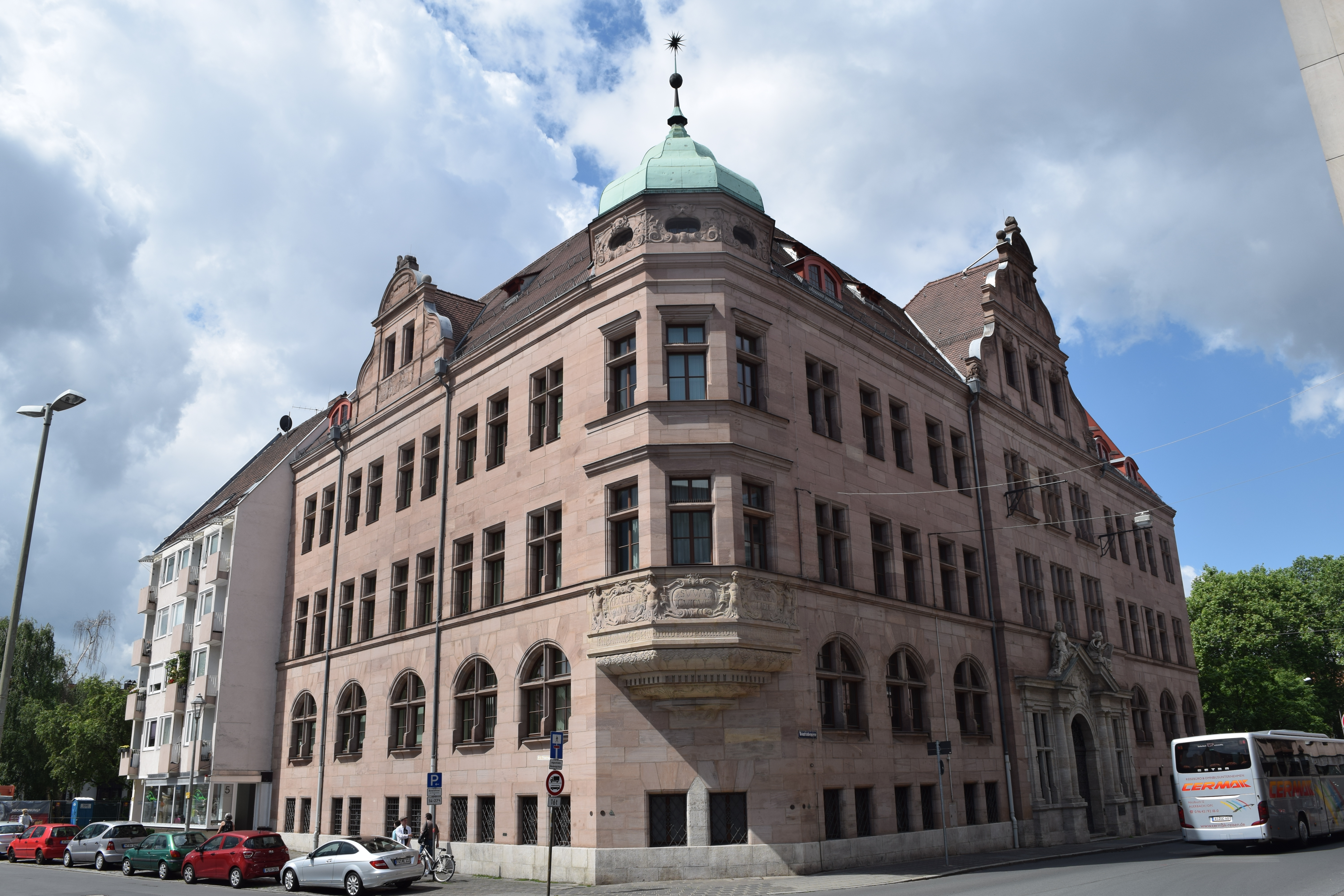 Gebäude des Sozialgerichtes Nürnberg in der Weintraubengasse 1